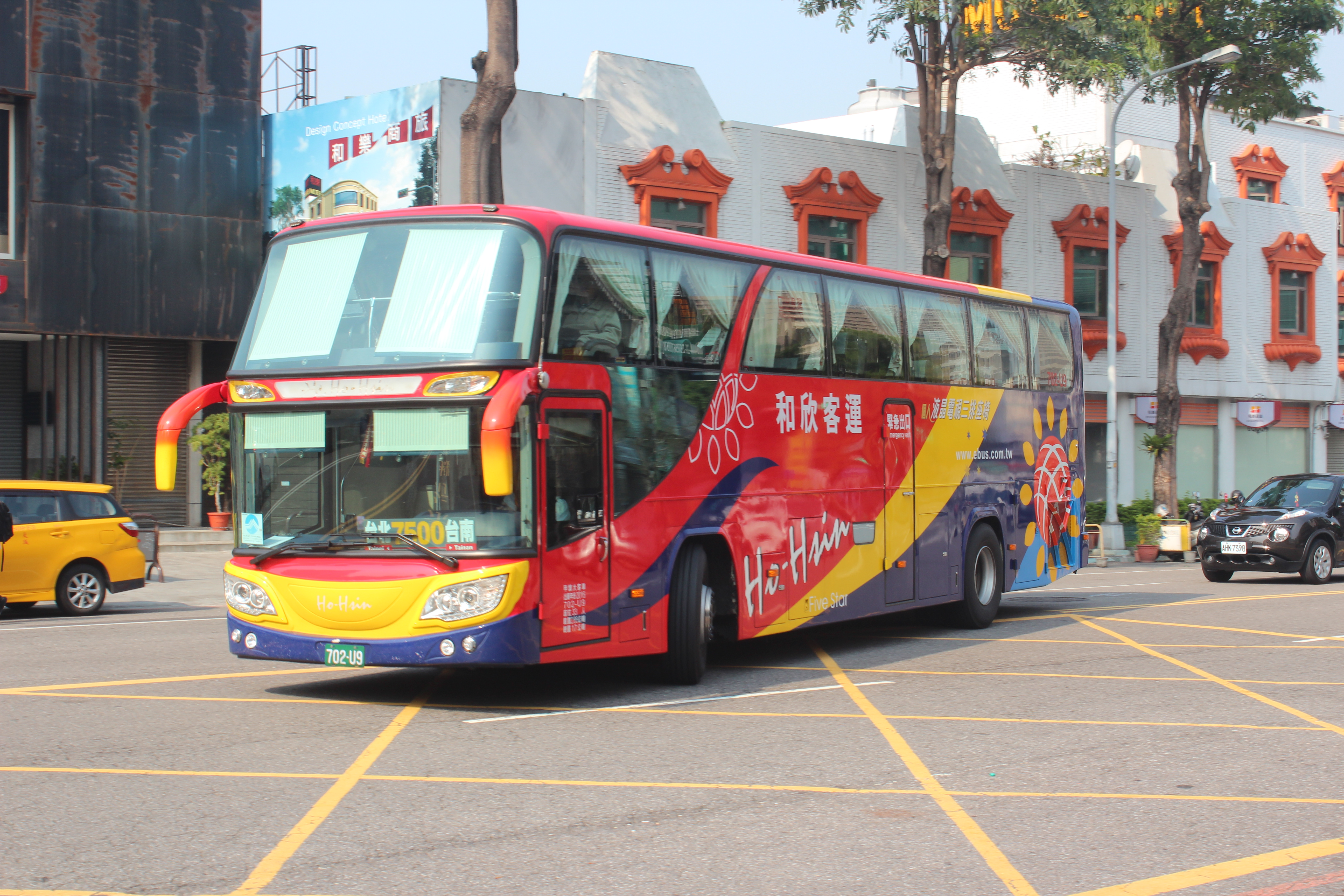 和欣客運2016年Scania K400IB4X2NB大客車702-U9，行駛7500線，在臺中市西屯區朝馬路和樂商旅前左轉。